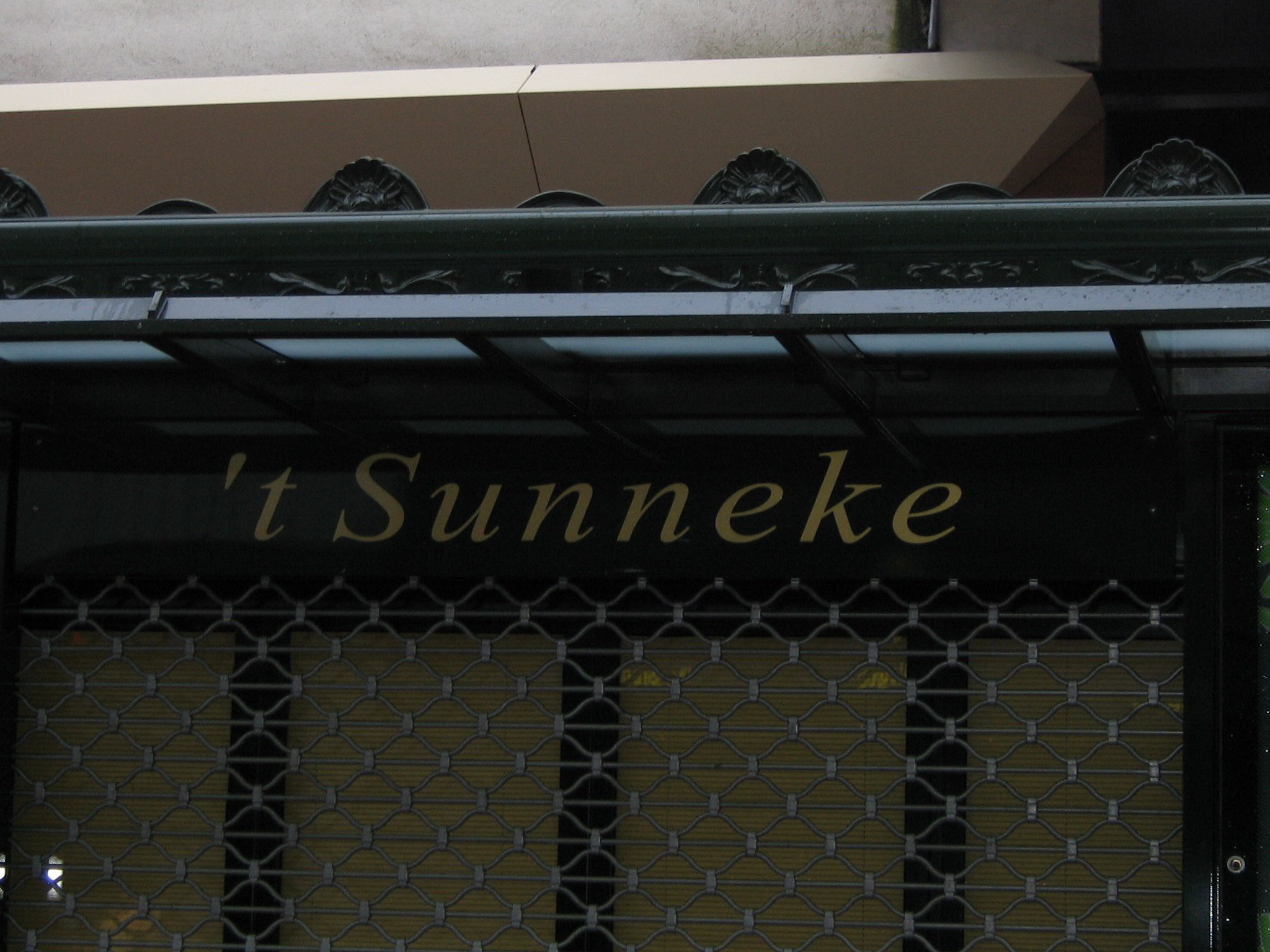 Kioskske in Nimwaege, met Nimwaegse naam. Kiosk in Nijmegen met naam in het dialect. Kiosk in Nijmegen, Netherlands, with name in local South Guelders dialect.